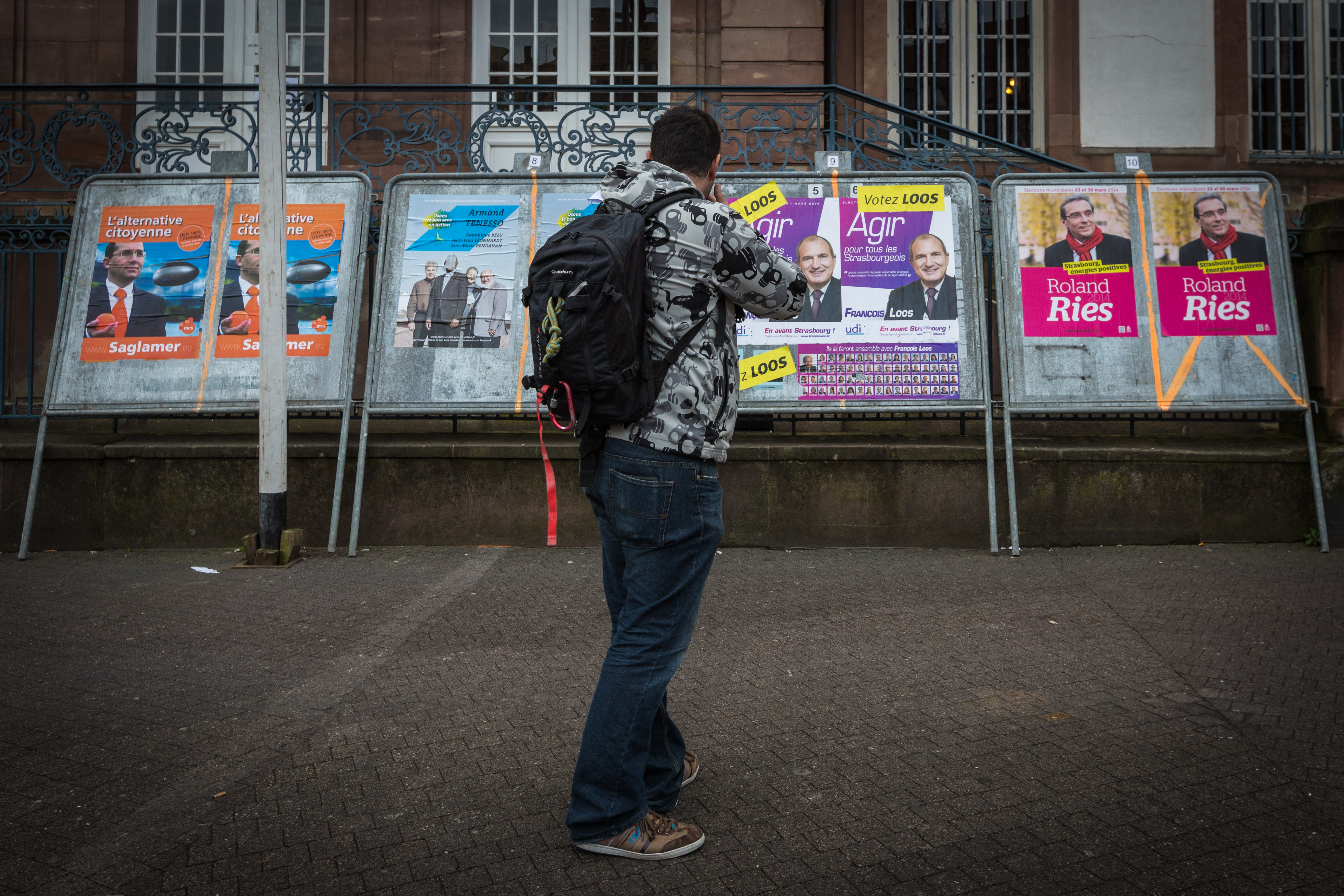 Strasbourg 1er tour des élections municiapales 23 mars 2014